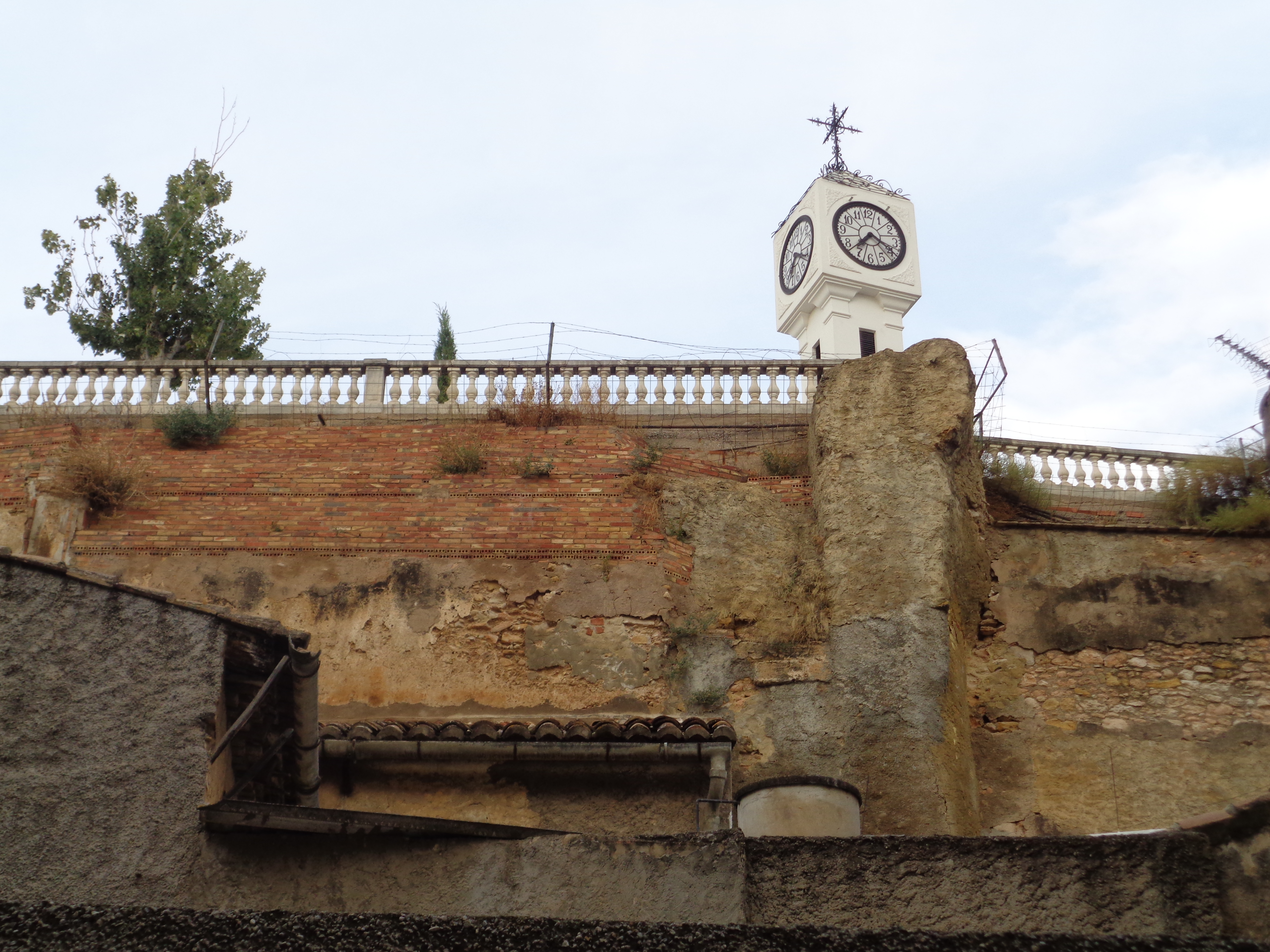 Paterna. 14.190-023.